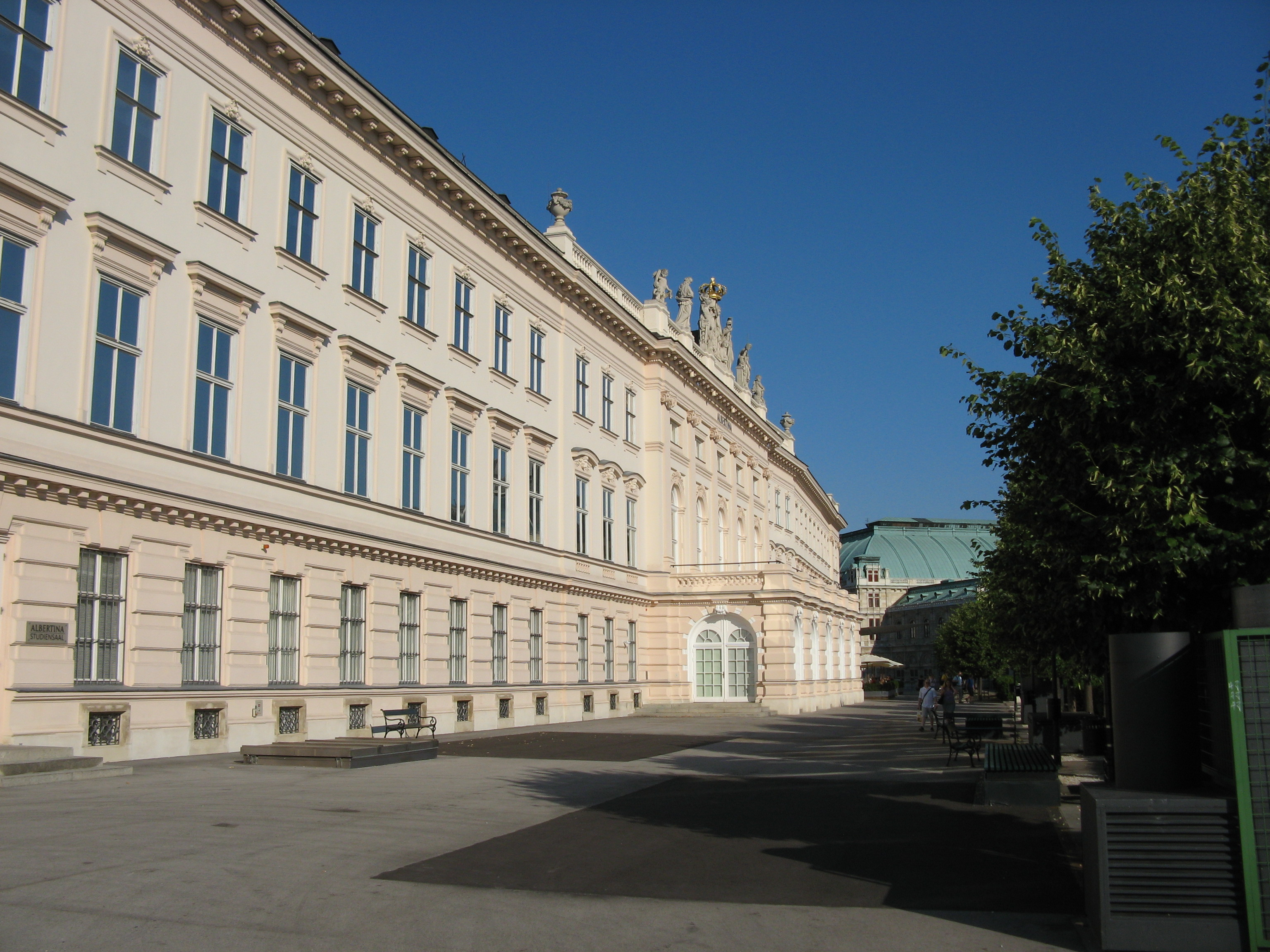 Augustinerbastei, Wien-Innere Stadt